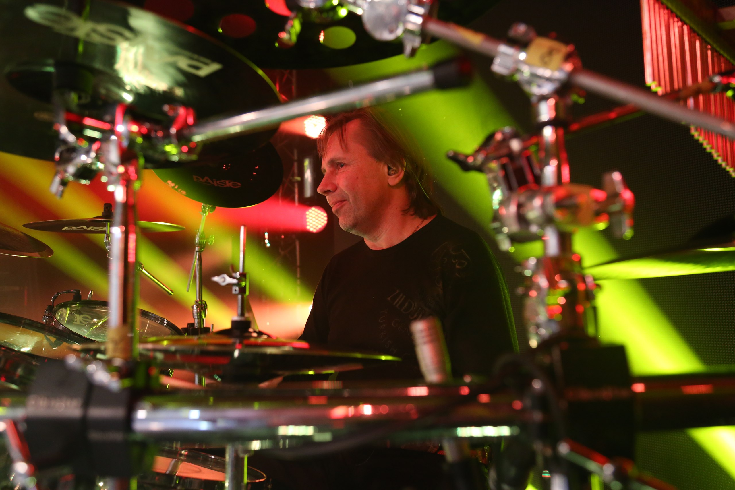 Настройка барабанов, перед выступлением. Москва 06.12.14